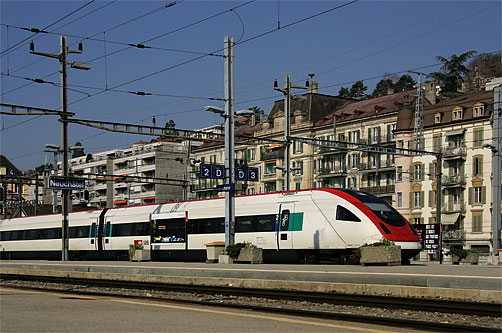 Bahnhof Neuchâtel